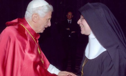 Äbtissin Mutter Clementia Killewald und Papst Benedikt XVI. im Oktober 2012